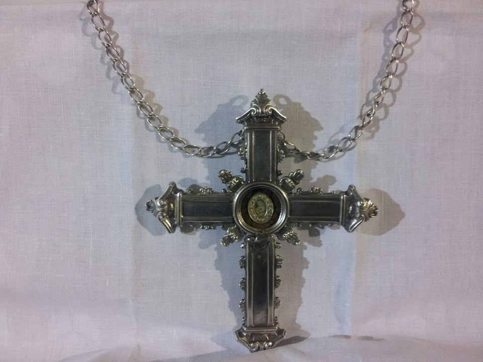 La Reliquia si trova all'interno di una croce d'argento.